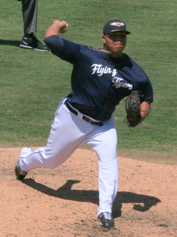 Bruce Rondón